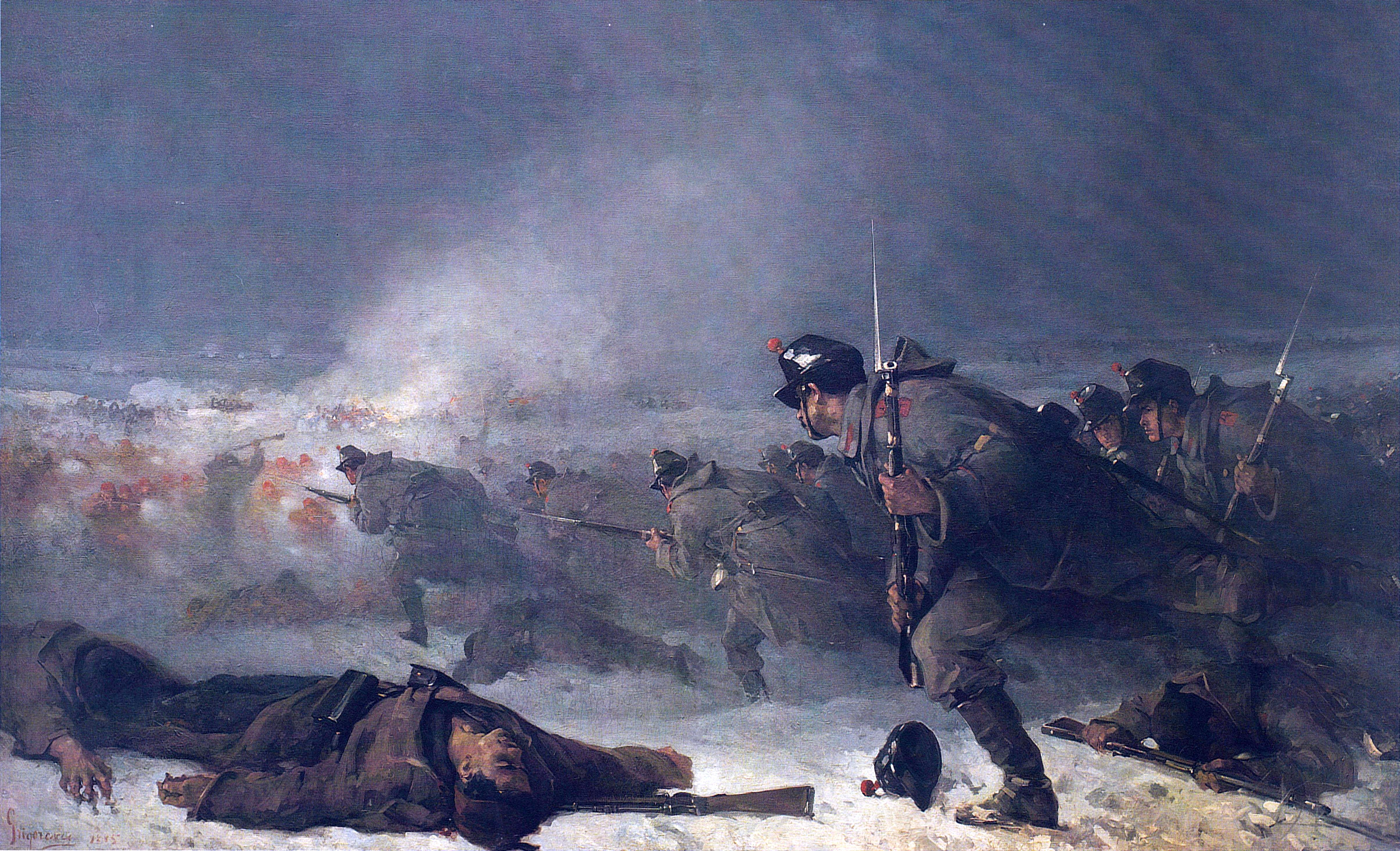 Atacul de la Smîrdan, ulei pe pânză; lemn; bronz aurit, 295×388 cm, nr.inv. 131525 - Muzeul Naţional de Istorie a României - BUCUREŞTI. Este redat un atac impetuos al infanteriei române împotriva redutei otomane de la Smârdan. Scenă de o impresionantă forţă expresivă asupra vigoarei şi elanului ostăşesc ridicate la proporţii de sinteză de către autorul picturii. Tabloul este înrămat cu o ramă din lemn vopsită cu bronz aurit. Este semnat şi datat în partea stângă jos cu roşu.